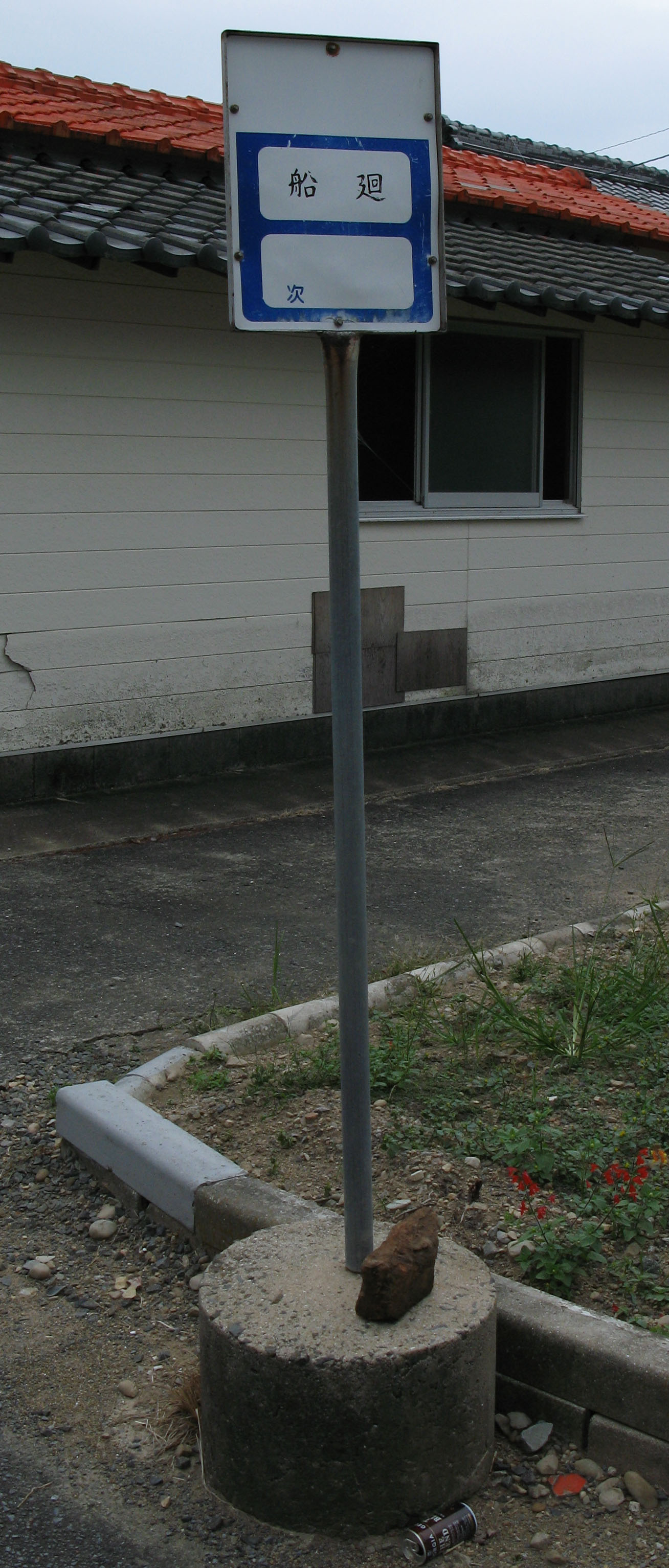 奈留島バス（正式社名：丸濱産業）のバス停